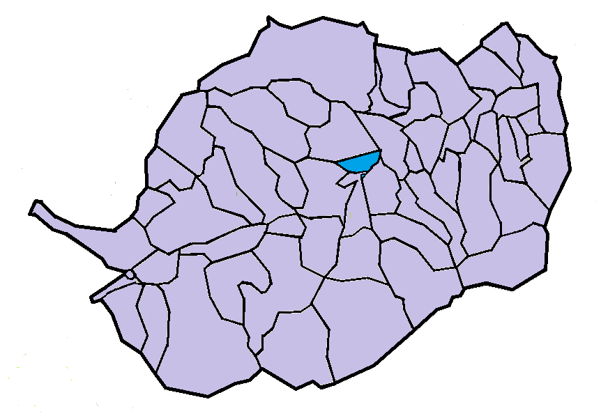 Vilafranca de Conflent en la seva comarca, a partir del mapa municipal del Conflent de lliure disposició adaptat al Nomenclàtor toponímic aprovat el 2007